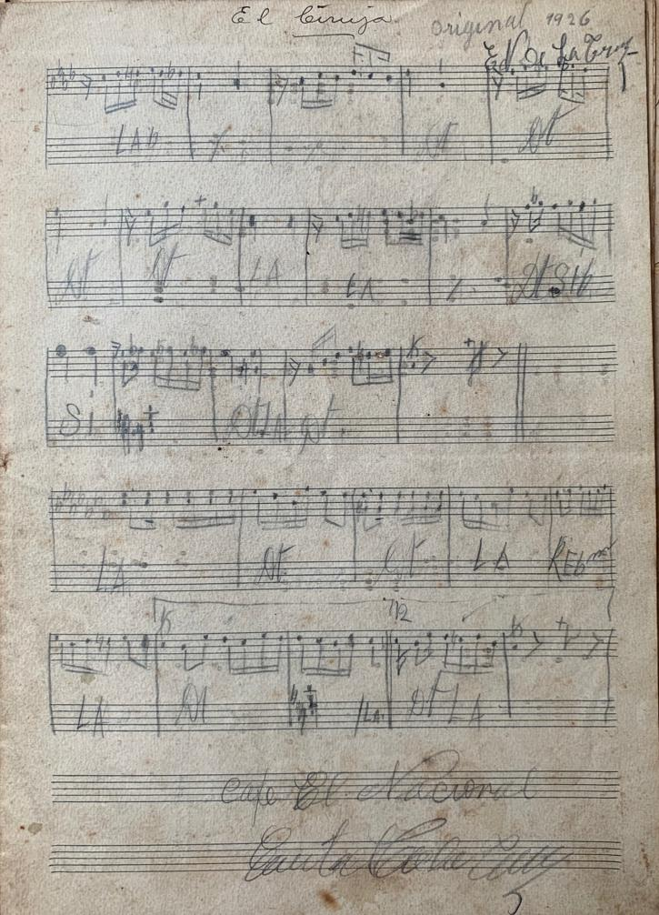 partitura original de el ciruja- 1926 - creada en "Cafe El Nacional"